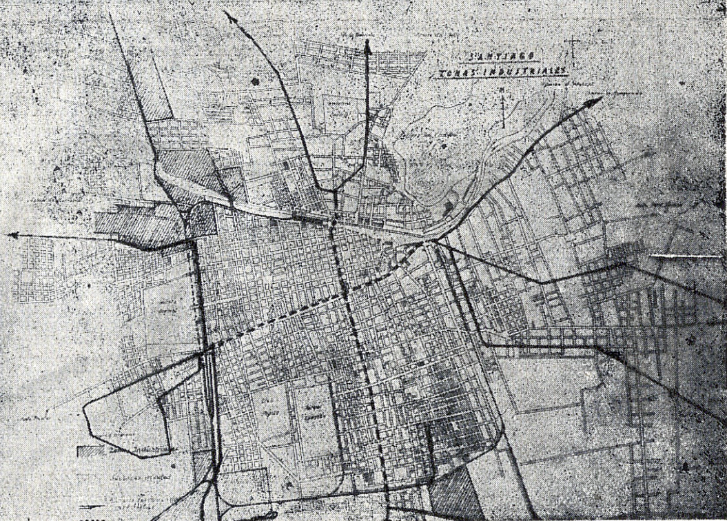 Mapa del trazado propuesto por Karl Brunner para el proyecto de ferrocarril metropolitano de Santiago